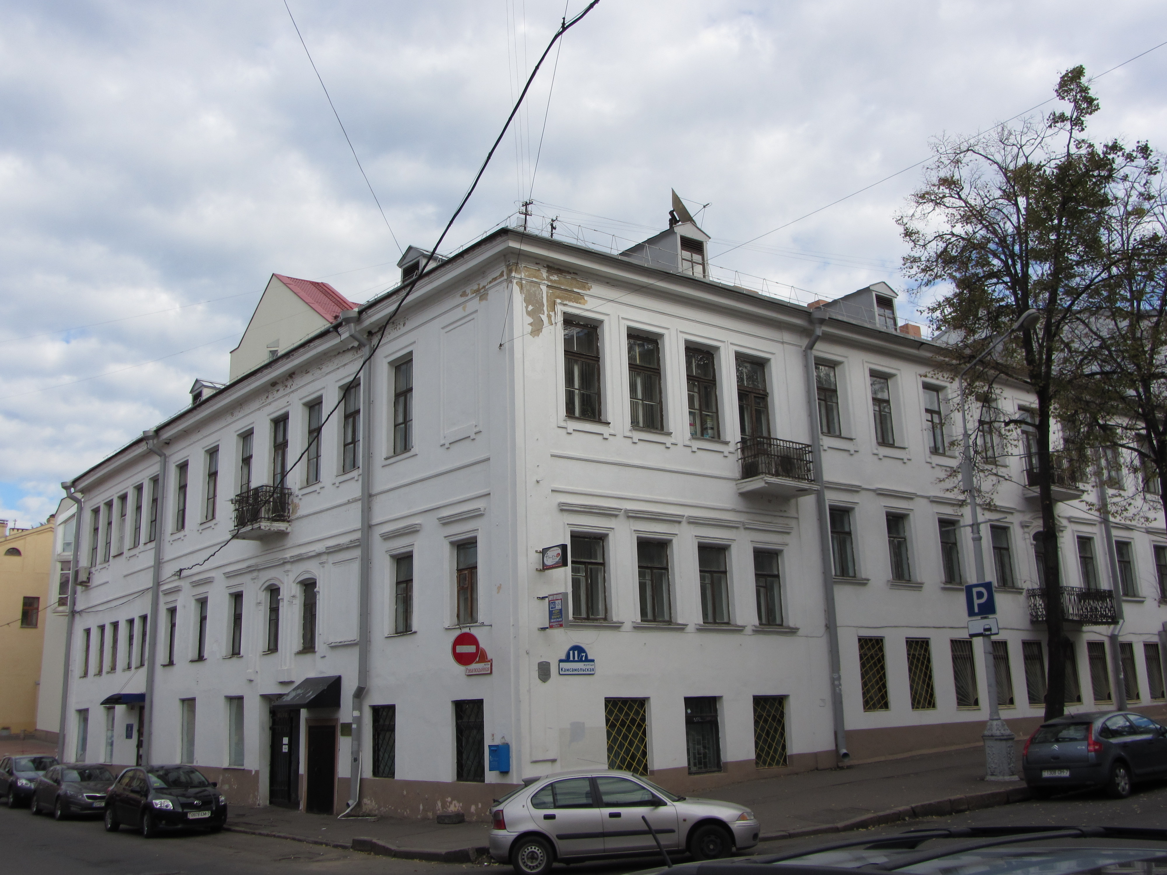 Беларуская (тарашкевіца): Камсамольская 11, Менск